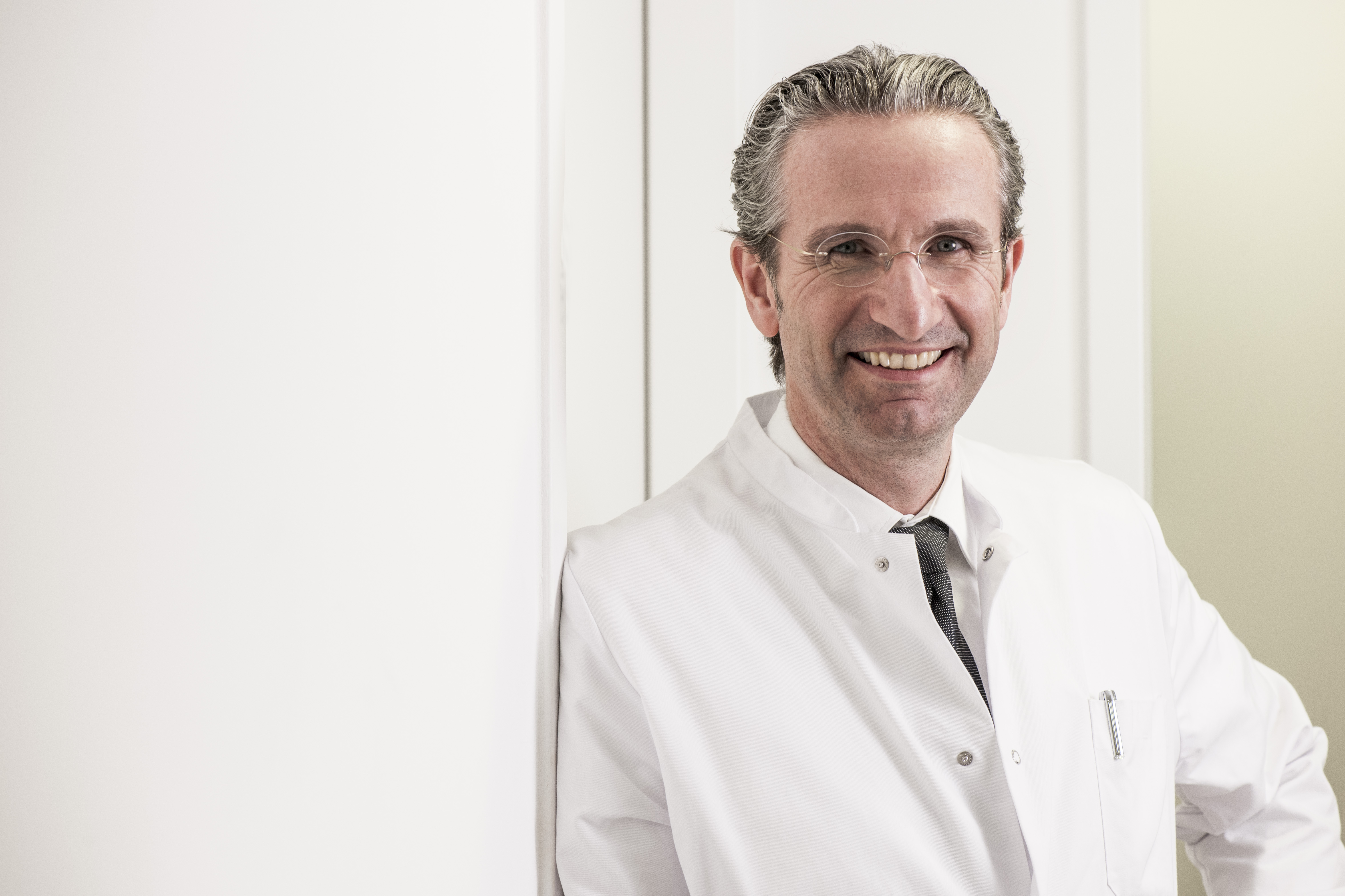 Prof. Dr. med. Christoph Andree, Plastischer Chirurg